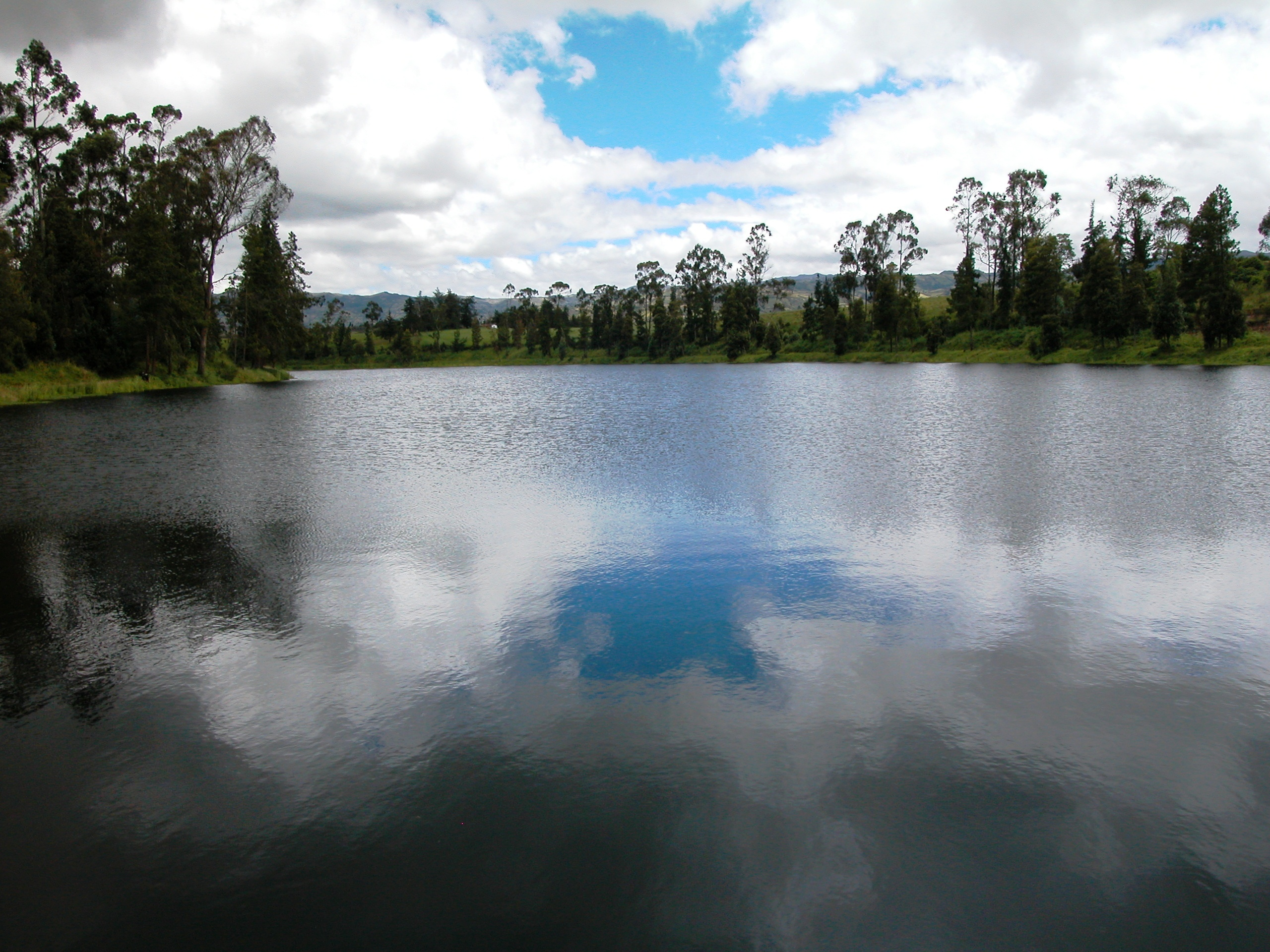 Laguna El Salado-San Gabriel prov Carchi